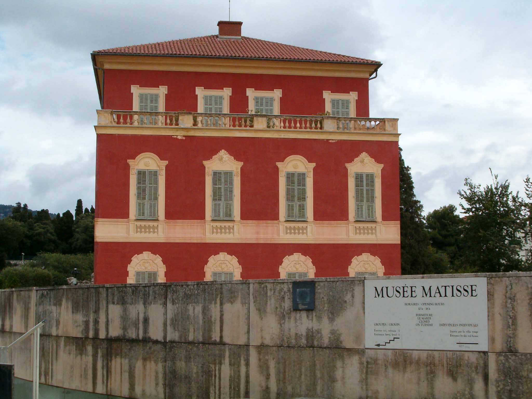 Musee Matisse Nice